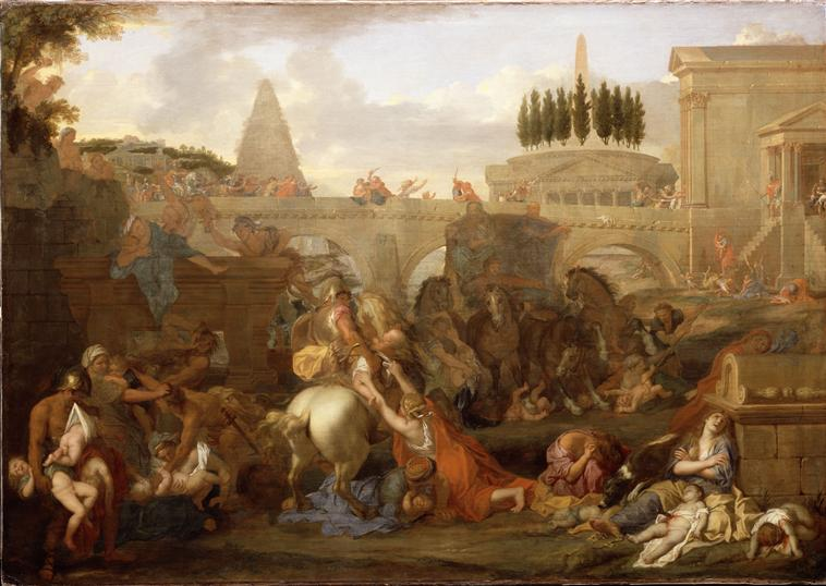 Charles Le Brun, Le Massacre des Innocents, après 1647, Londres, Dulwich Picture Gallery